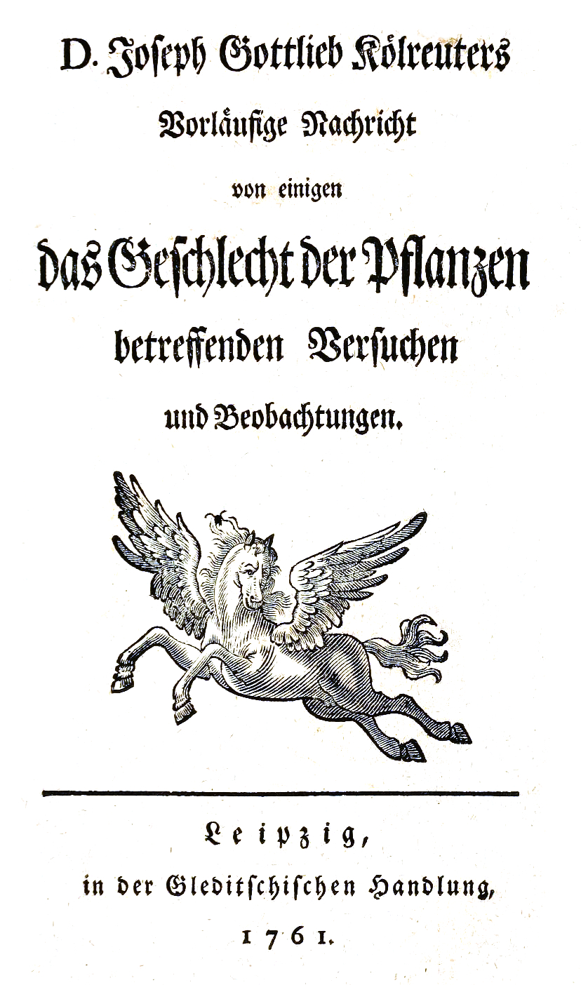 Title page of D. Joseph Gottlieb Kölreuters Vorläufige Nachricht von einigen das Geschlecht der Pflanzen betreffenden Versuchen und Beobachtungen